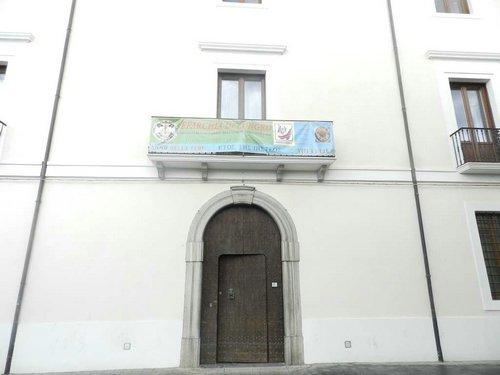 L'eparchia di Lungro degli Italo-Albanesi è una sede della Chiesa cattolica italo-albanese di rito orientale immediatamente soggetta alla Santa Sede e appartenente alla regione ecclesiastica Calabria.